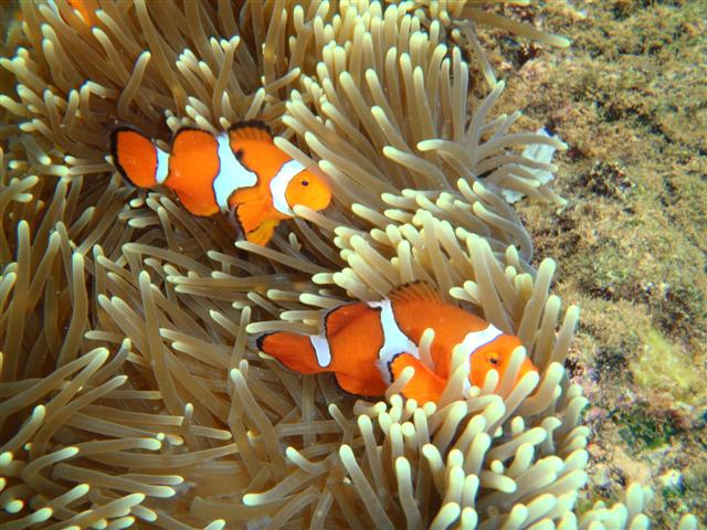 Amphiprion ocellaris